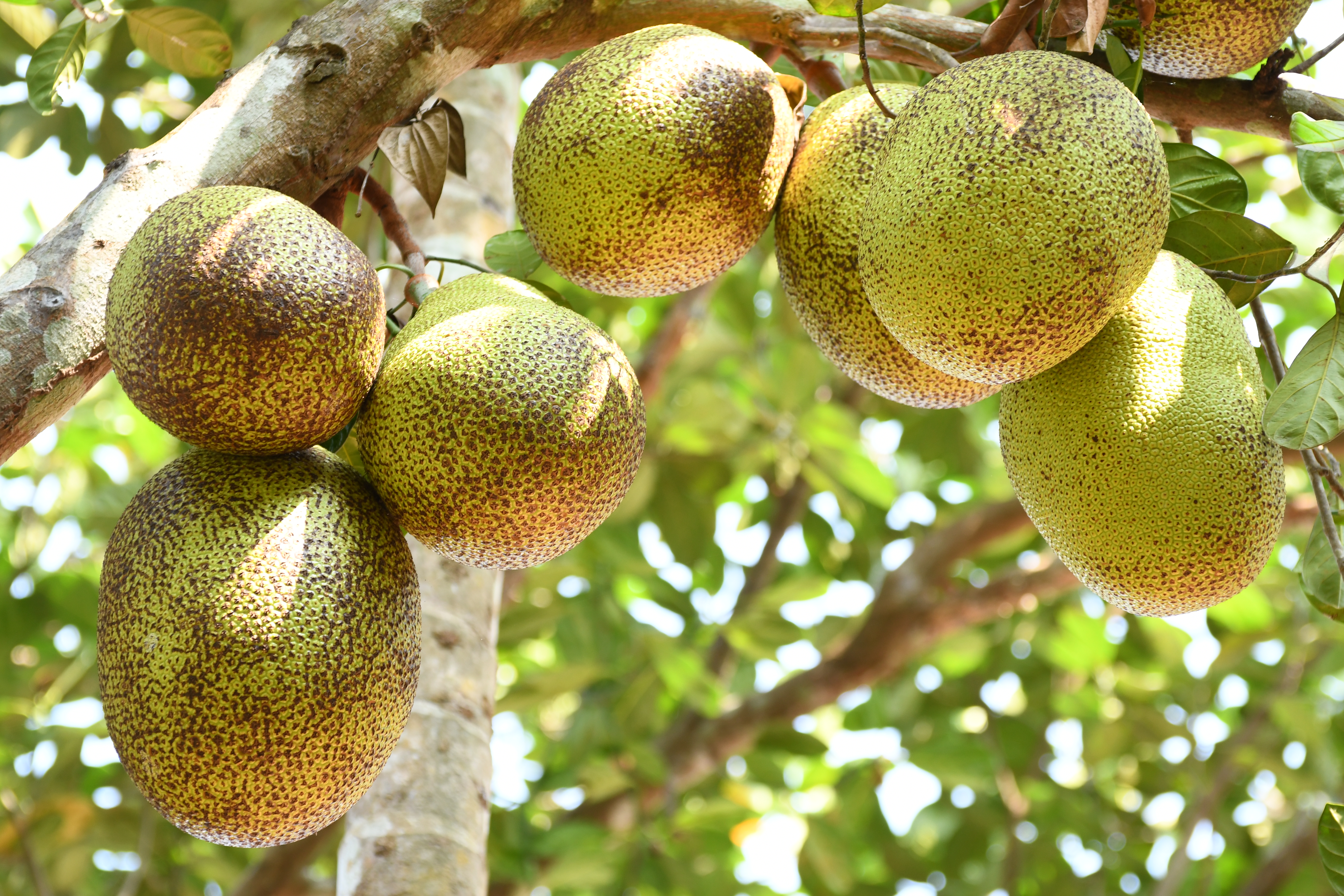 ചക്ക